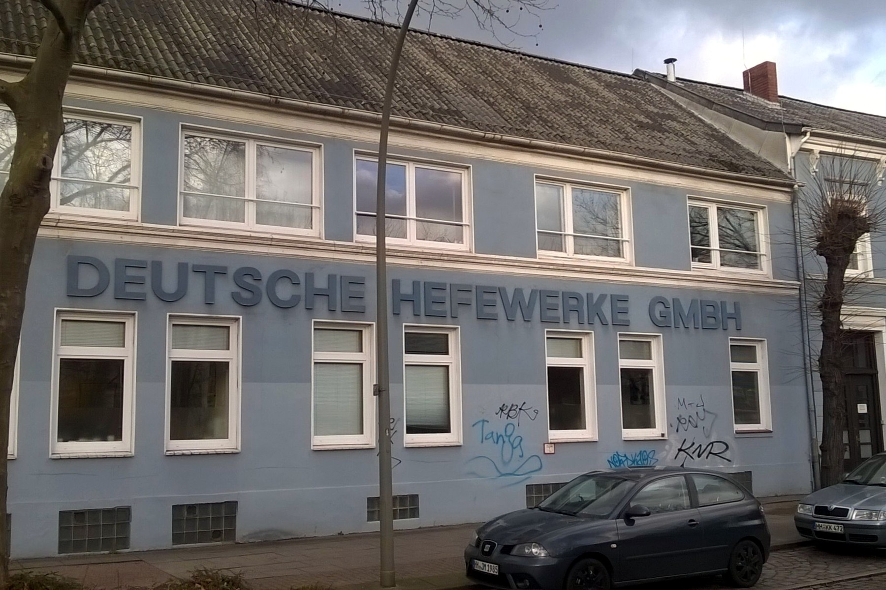 Früherer Firmenname "Deutsche Hefewerke GmbH" (heute Ohly GmbH) in der Wandsbeker Zollstraße 59 in Hamburg